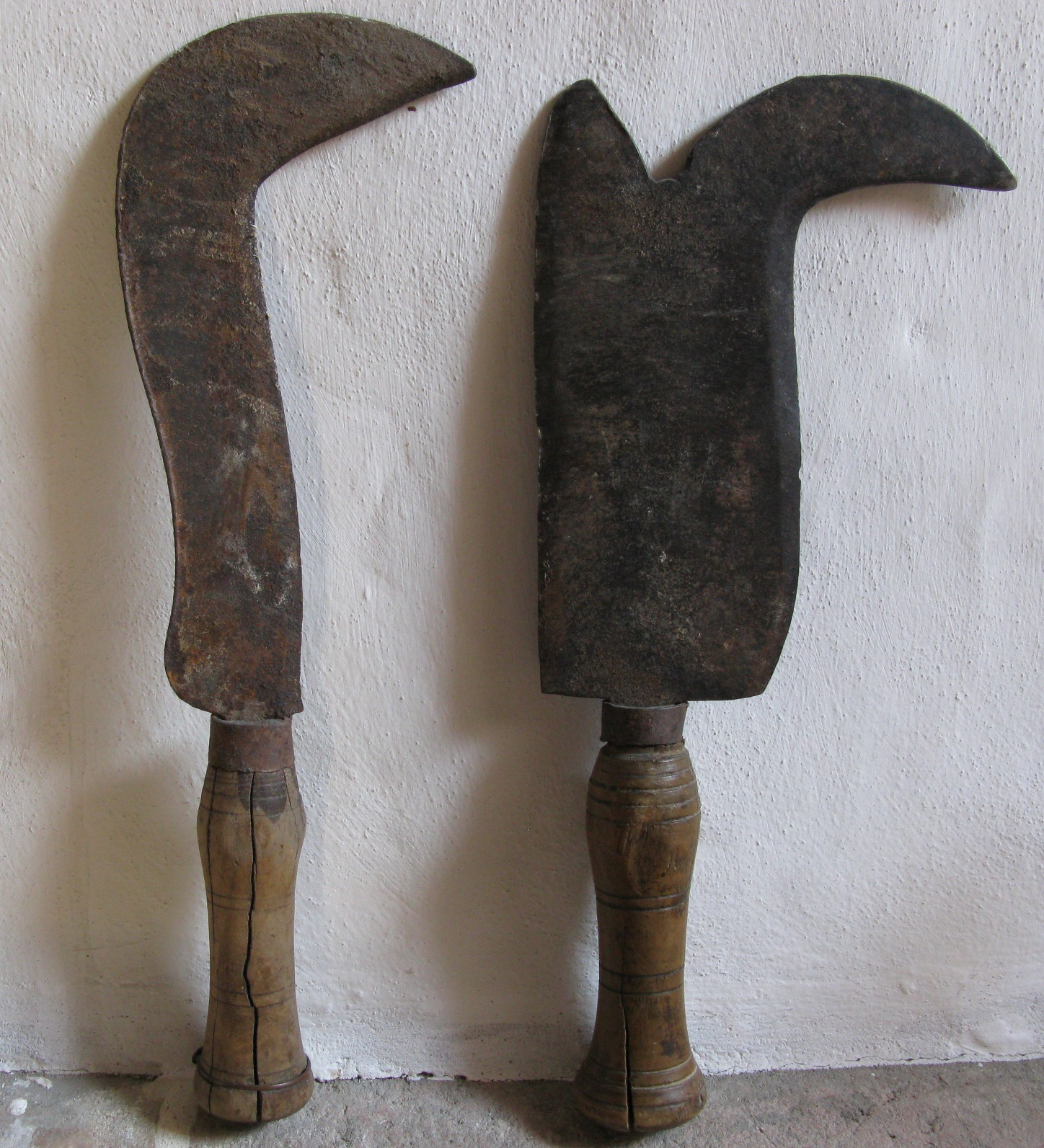 Hippe, Hiebmesser